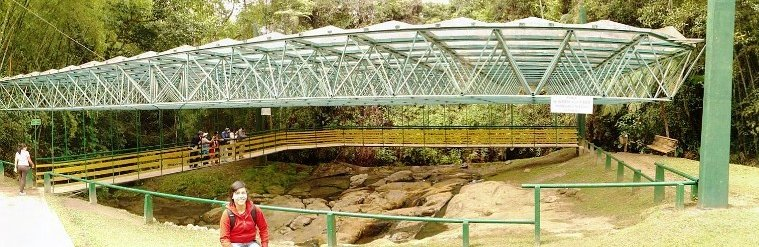 lava patas san agustin Colombia